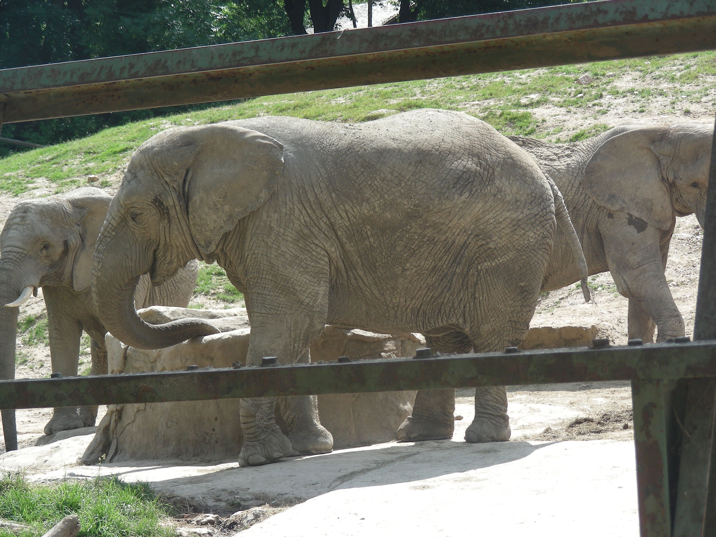 Die drei Elefanten des Opelzoo im Juni 2011 in ihrem Aussengehege.